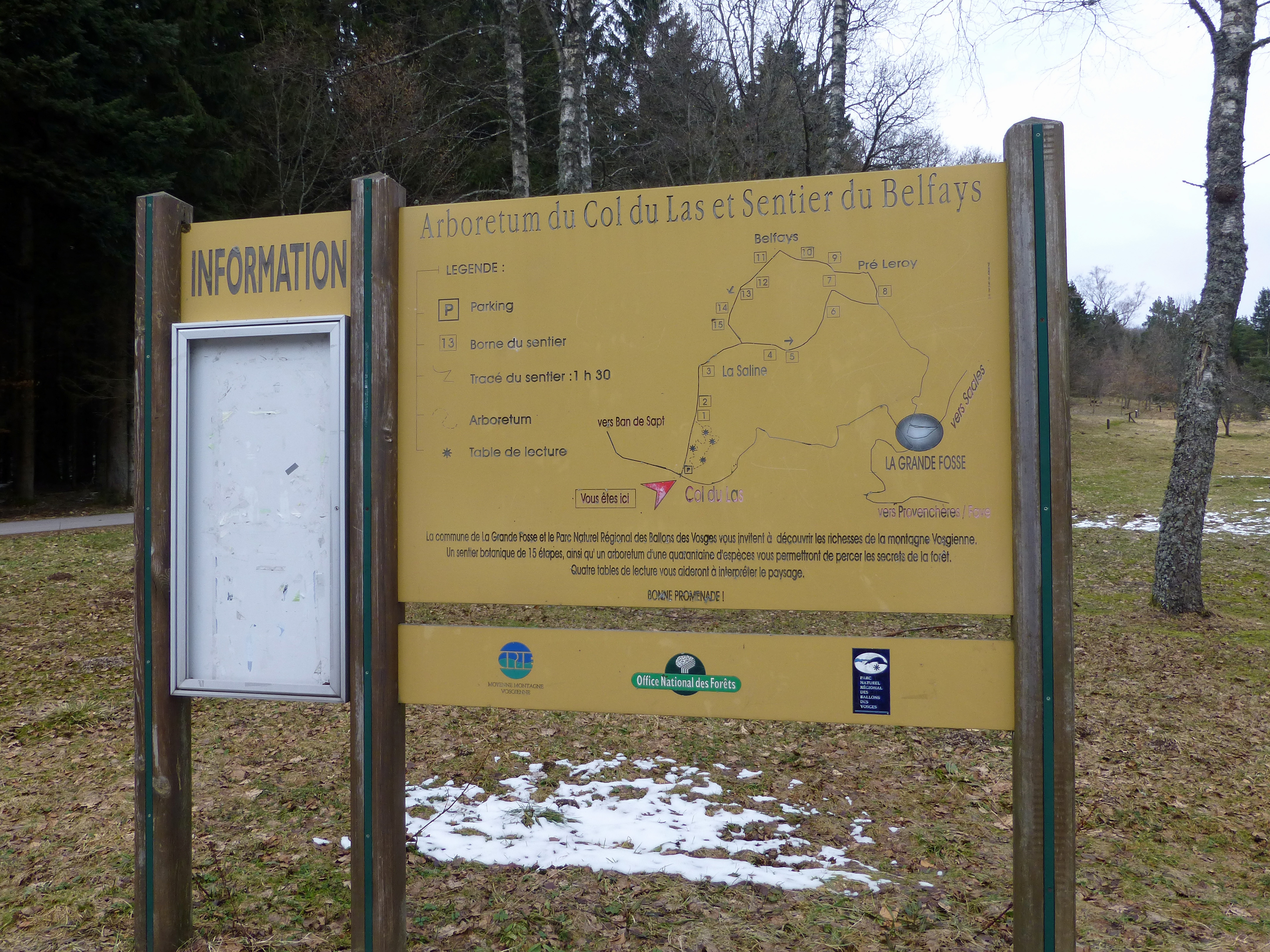 Col du Las (Vosges) en hiver